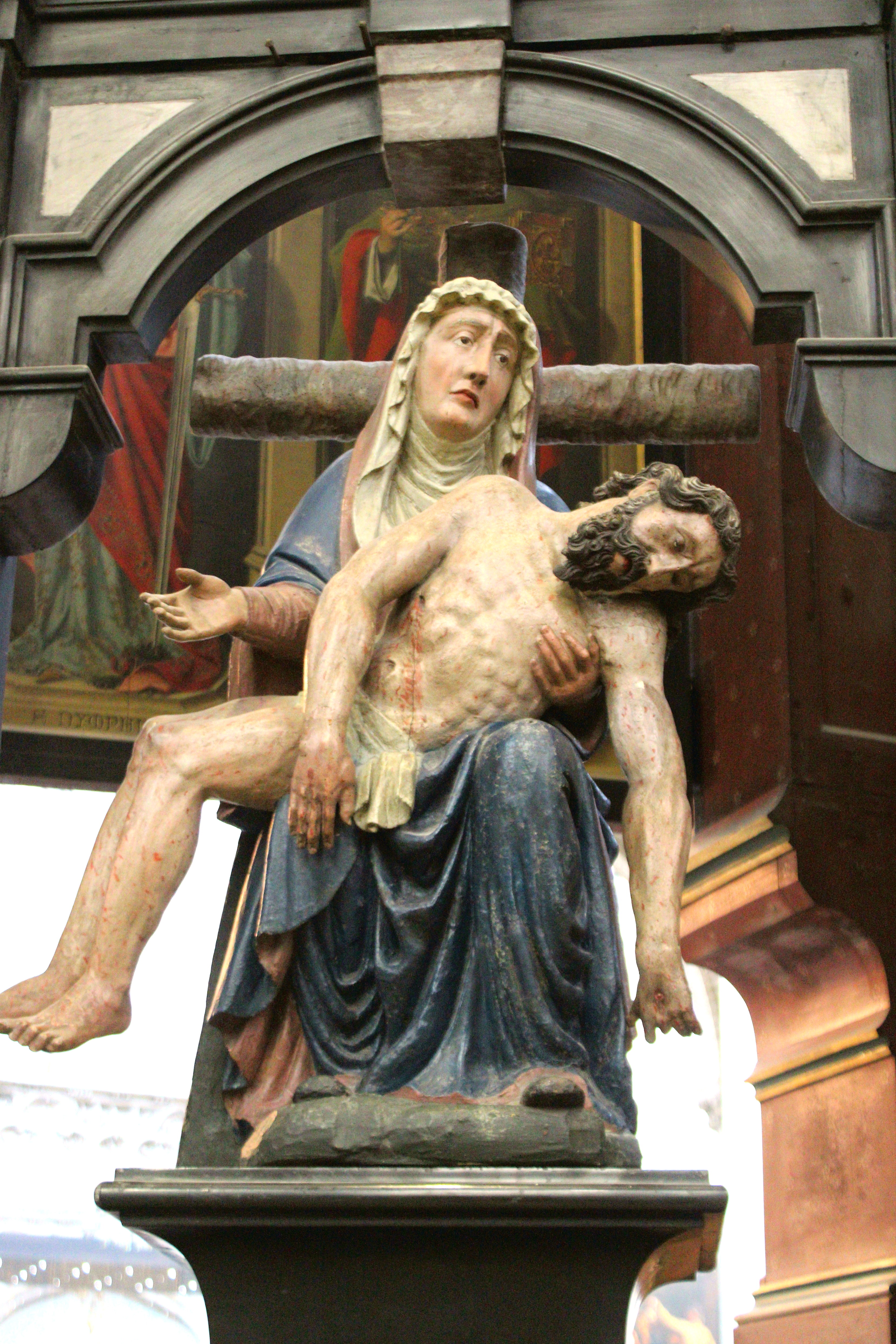 Sint-Gummaruskerk, Lier, België. Pietà in de koorgang door Thomas Haesaert (rond 1600)